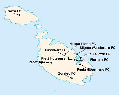 Répartition des clubs en Premier League Maltaise 1999-2000.